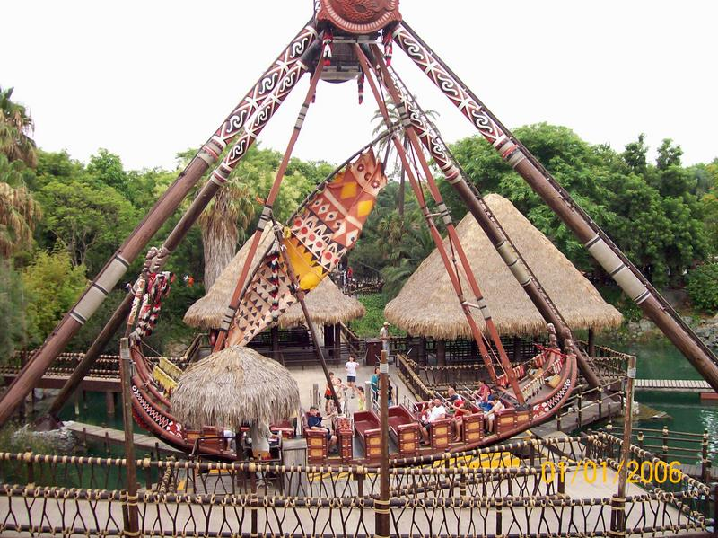 Kon Tiki Wave in Port aventura